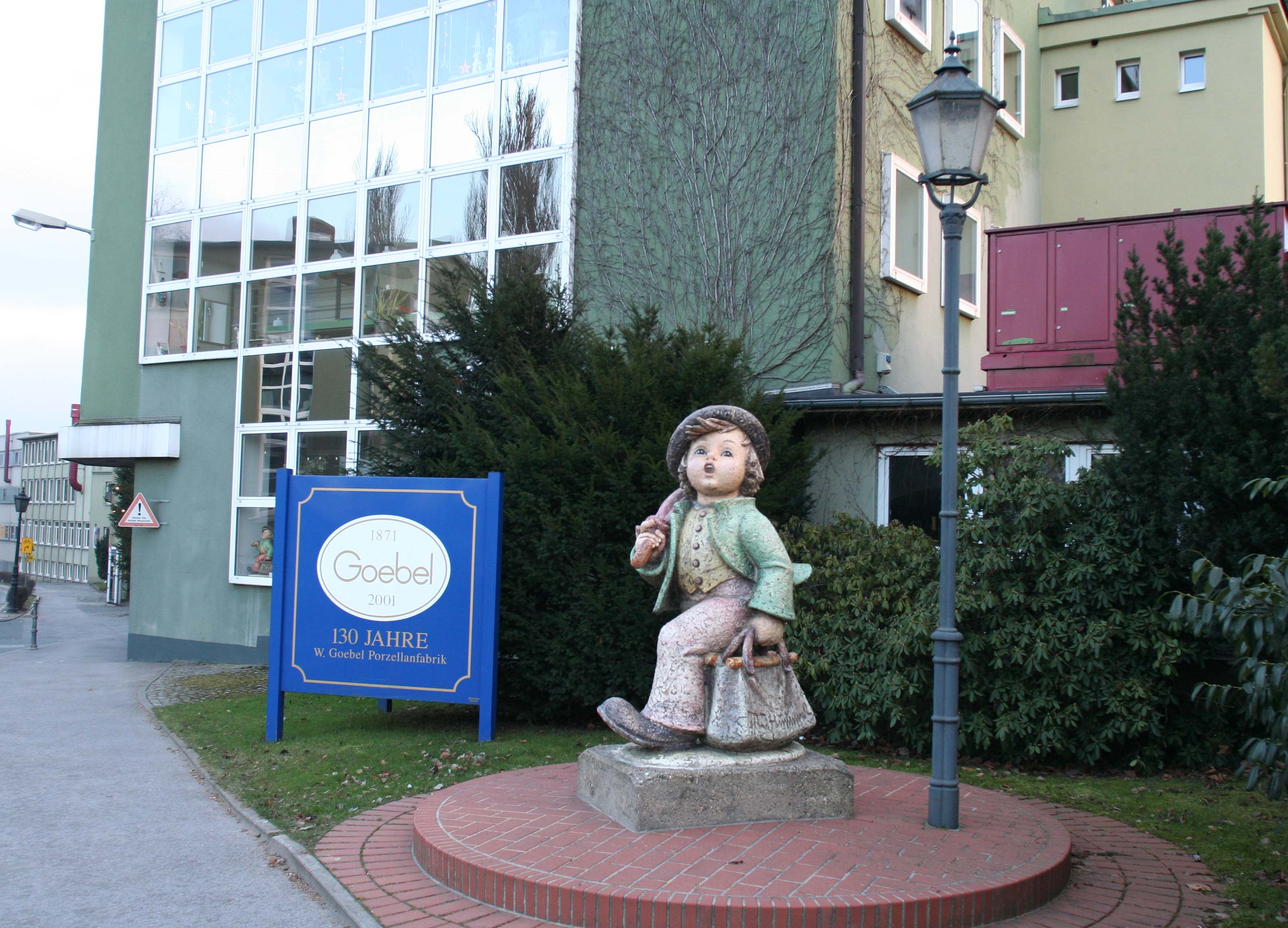 Porzellanfabrik W. Goebel in Rödental, Landkreis Coburg